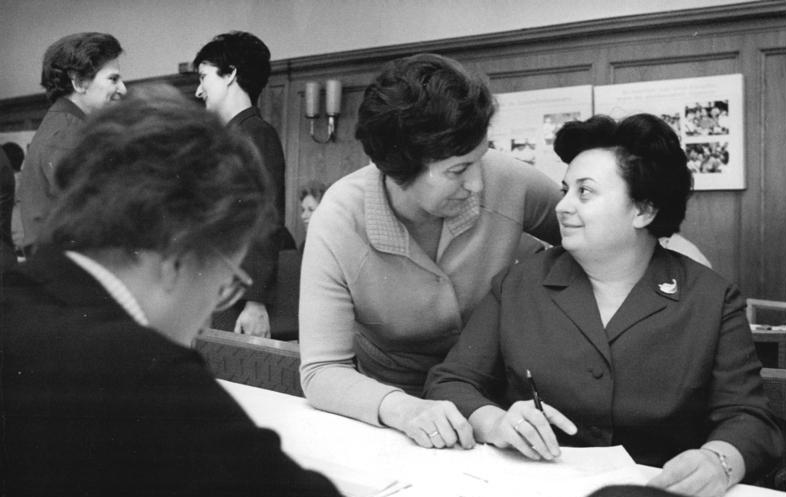 Zentralbild Mittelstädt Sche 11.12.1968 Berlin: Bundesvorstandssitzung des DFD. Der Bundesvorstand des DFD führte am 11.12.1968 im Ribbeckhaus seine 14. Sitzung durch. Hier unterhalten sich während einer Beratungspause die Vorsitzende des Bundesvorstandes des DFD, Ilse Thiele (links), und die Vorsitzende des DFD im Bezirk Rostock, Hannelore Hauschild. Auf der bedeutsamen Tagung wurden die bisherigen Ergebnisse der Wahlen im DFD und die weiteren Vorbereitungen zum 2. Frauenkongreß behandelt.